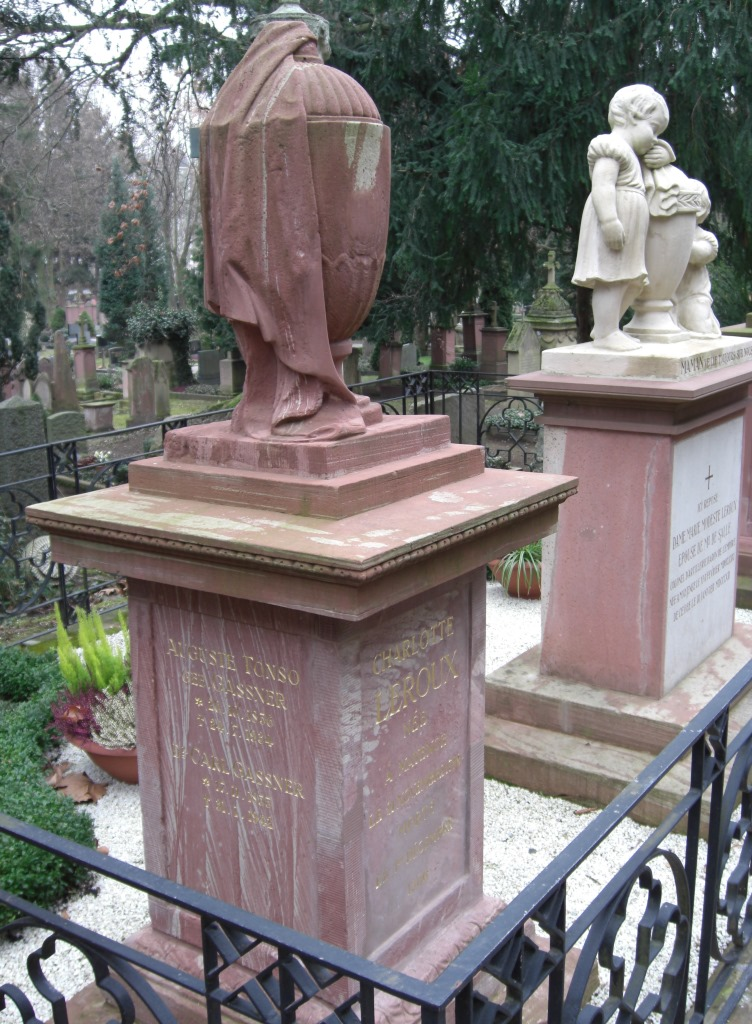 Grab des Mediziners und Erfinders Carl Gassner, 1855-1942, auf dem Hauptfriedhof Mainz